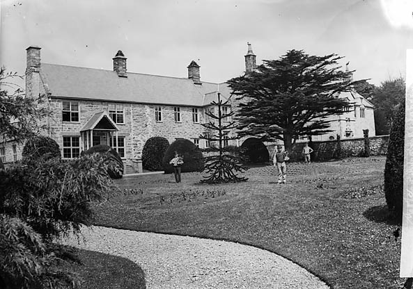 Teitl Cymraeg/Welsh title:Plas Corsygedol, Llanddwywe-is-y-graig Ffotograffydd/Photographer: John Thomas (1838-1905) Dyddiad/Date: [ca. 1875] Cyfrwng/Medium: Negydd gwydr / Glass negative Maint/Dimensions: 12 x 16.5 cm. Cyfeiriad/Reference:jth02271 Rhif cofnod / Record no.: 3363209 Rhagor o wybodaeth am gasgliad John Thomas yn Llyfrgell Genedlaethol Cymru More information about the John Thomas Collection at the National Library of Wales Mae ffotograffau John Thomas hefyd yn rhan o Broject Europeana Libraries John Thomas' photographs also form part of the Europeana Libraries Project